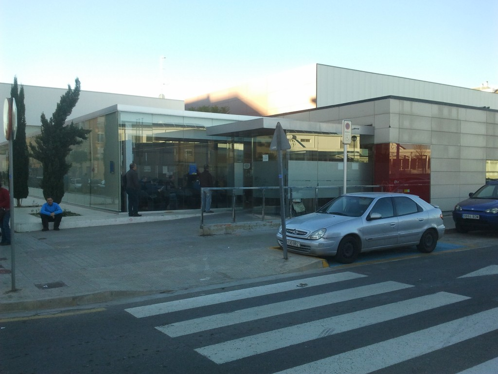 Centro Servef de Empleo de Catarroja.